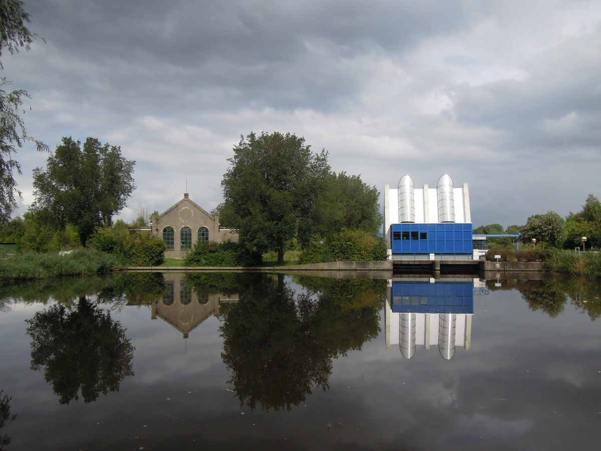 Oude geemaal (uit 1875) en nieuwe gemaal (uit 1987) aan de Kadoelerbreek in Amsterdam